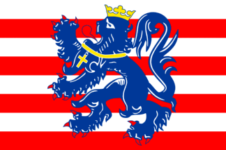 categorie:afbeelding Brugge